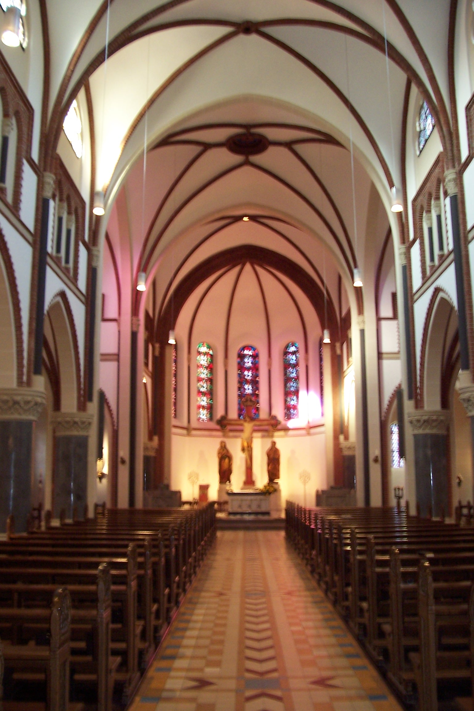 Innenansicht der katholischen Pfarrkirche St. Sebastian (Bonn-Poppelsdorf)